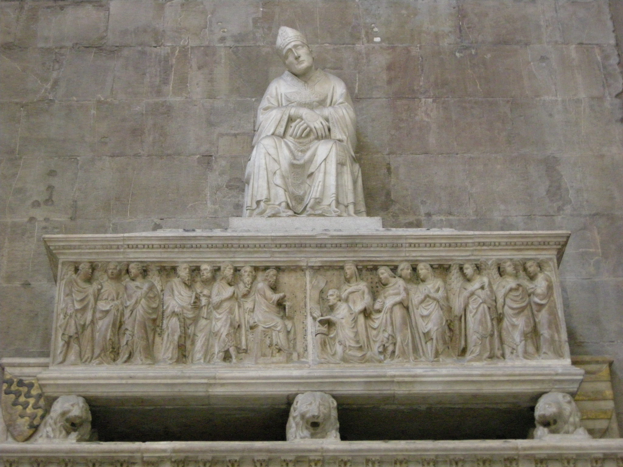 Smf, tomba antonio dell'orso by tino di camaino